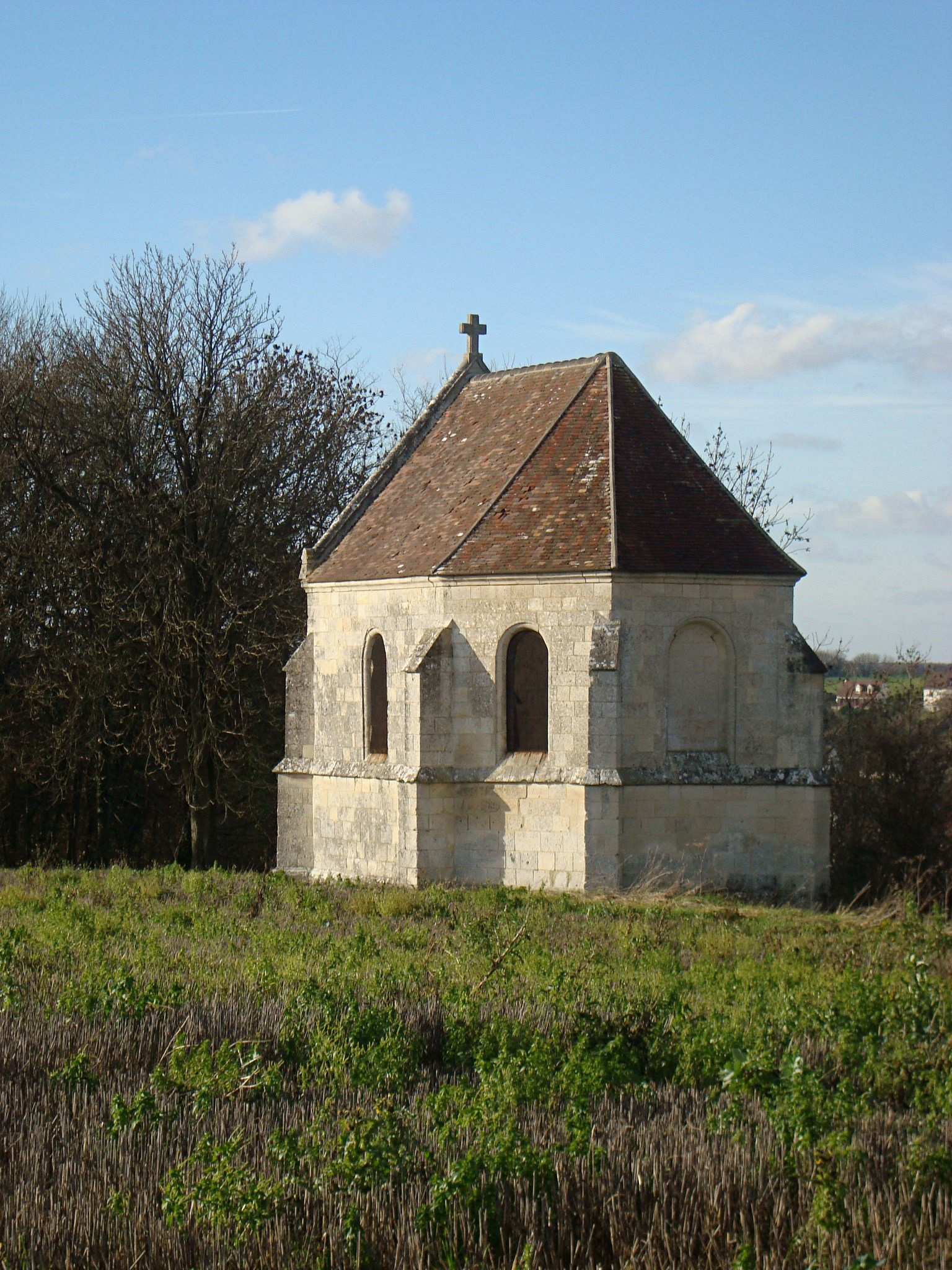 Chapelle Saint Anobert, Morienval, oise, France.